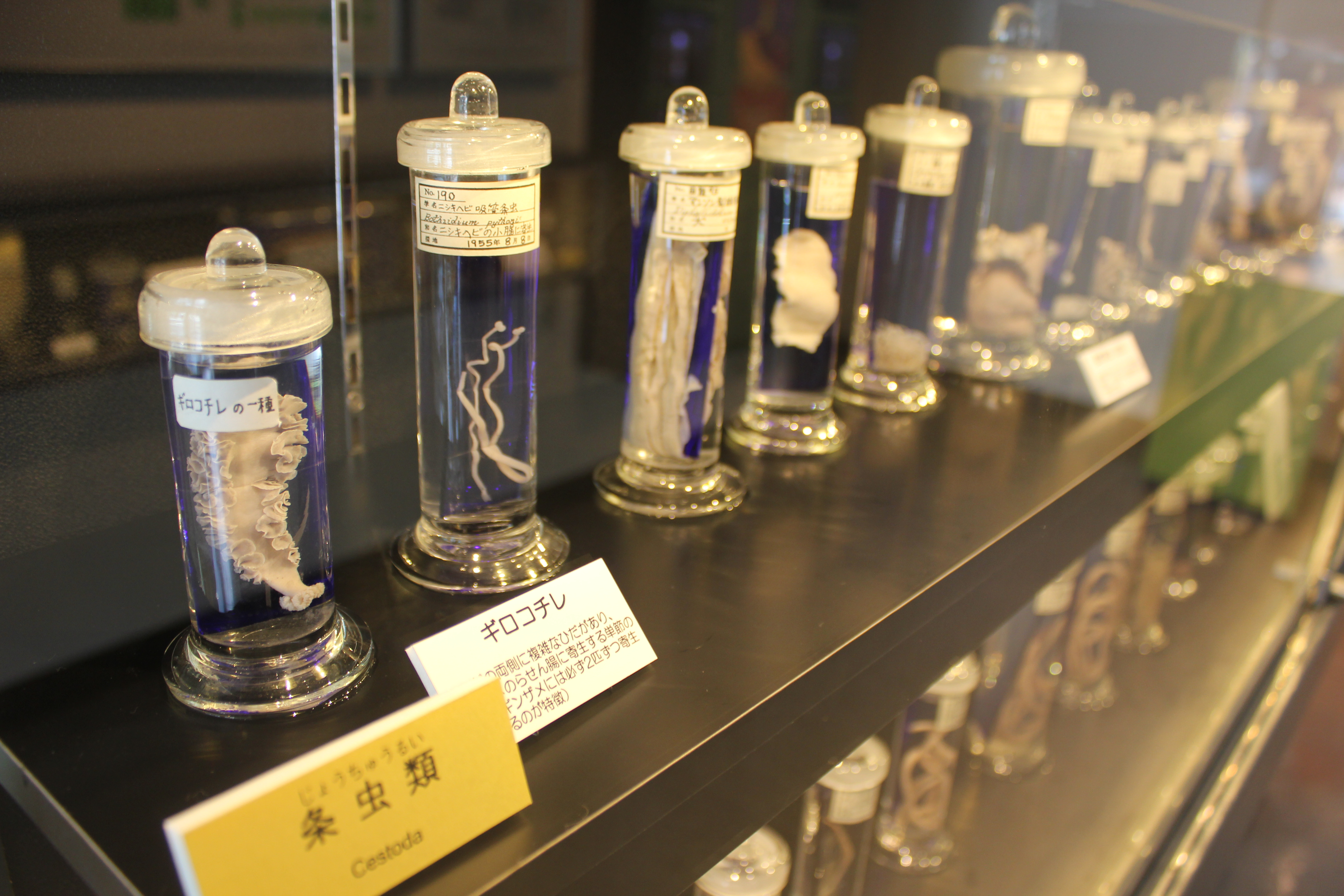 Meguro Parasitological Museum